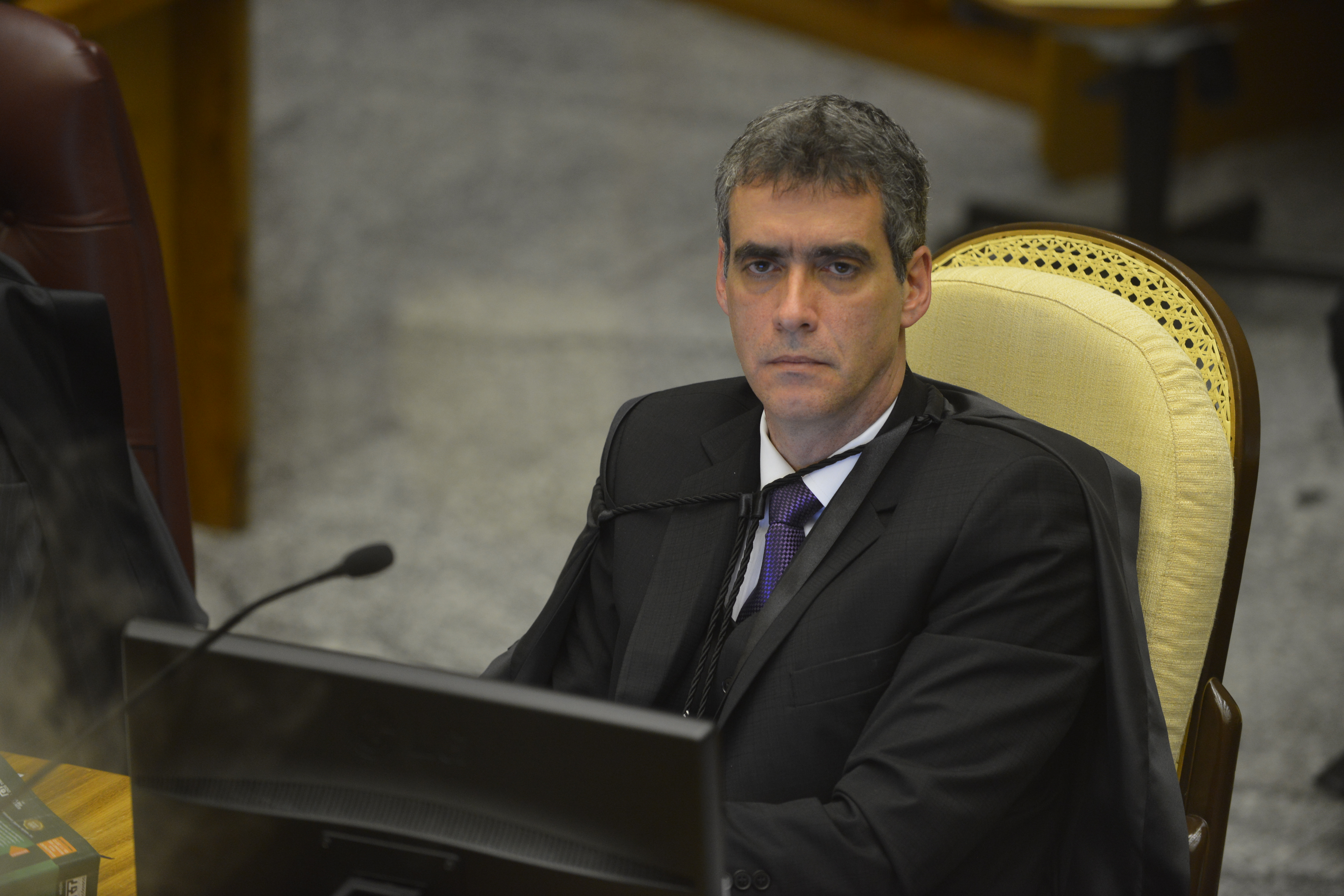 Ministro Rogerio Schietti Machado Cruz